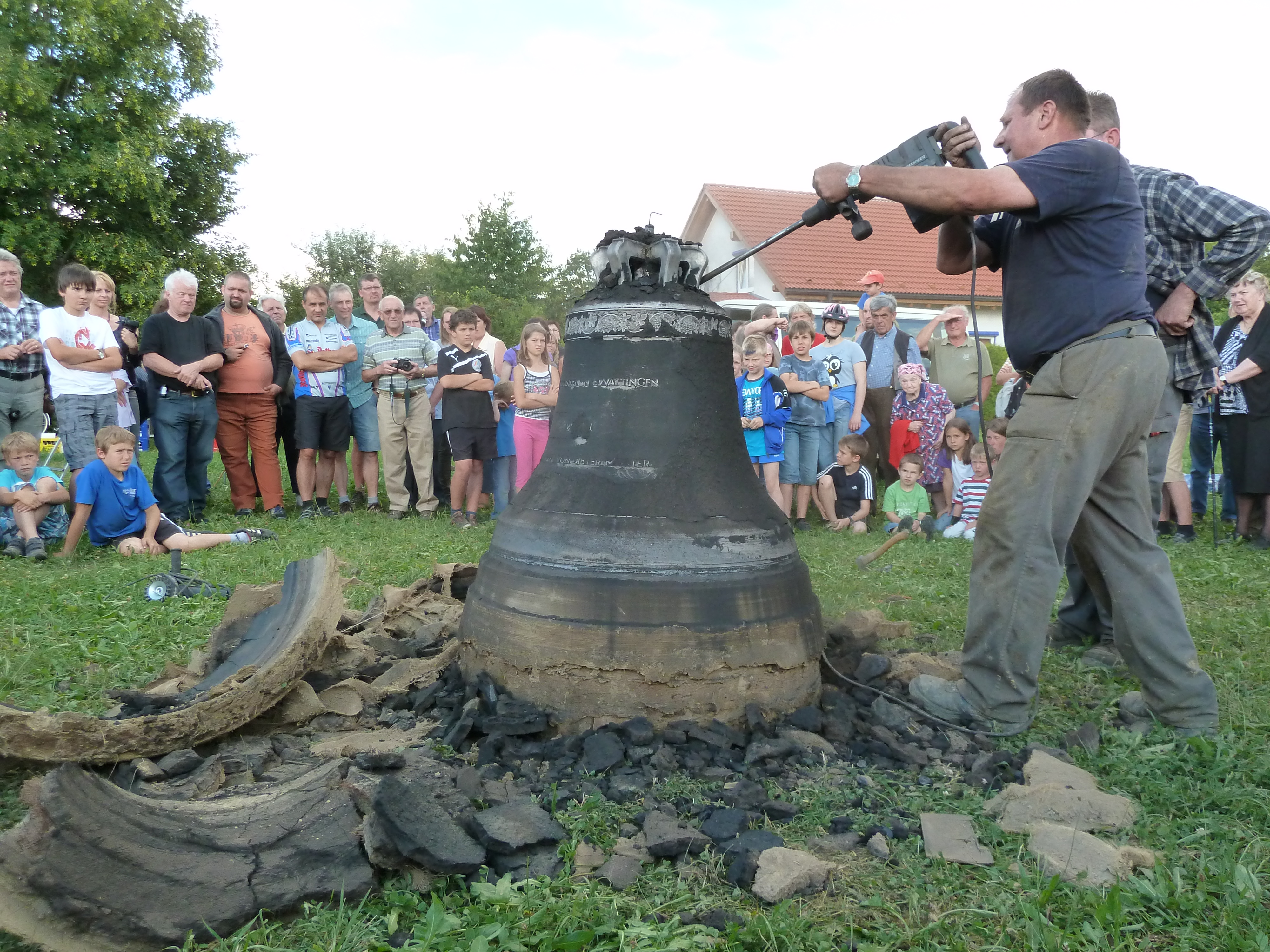 Glockenguss in Ewattingen mit Bruder Michael Reuter von der Abtei Maria Laach